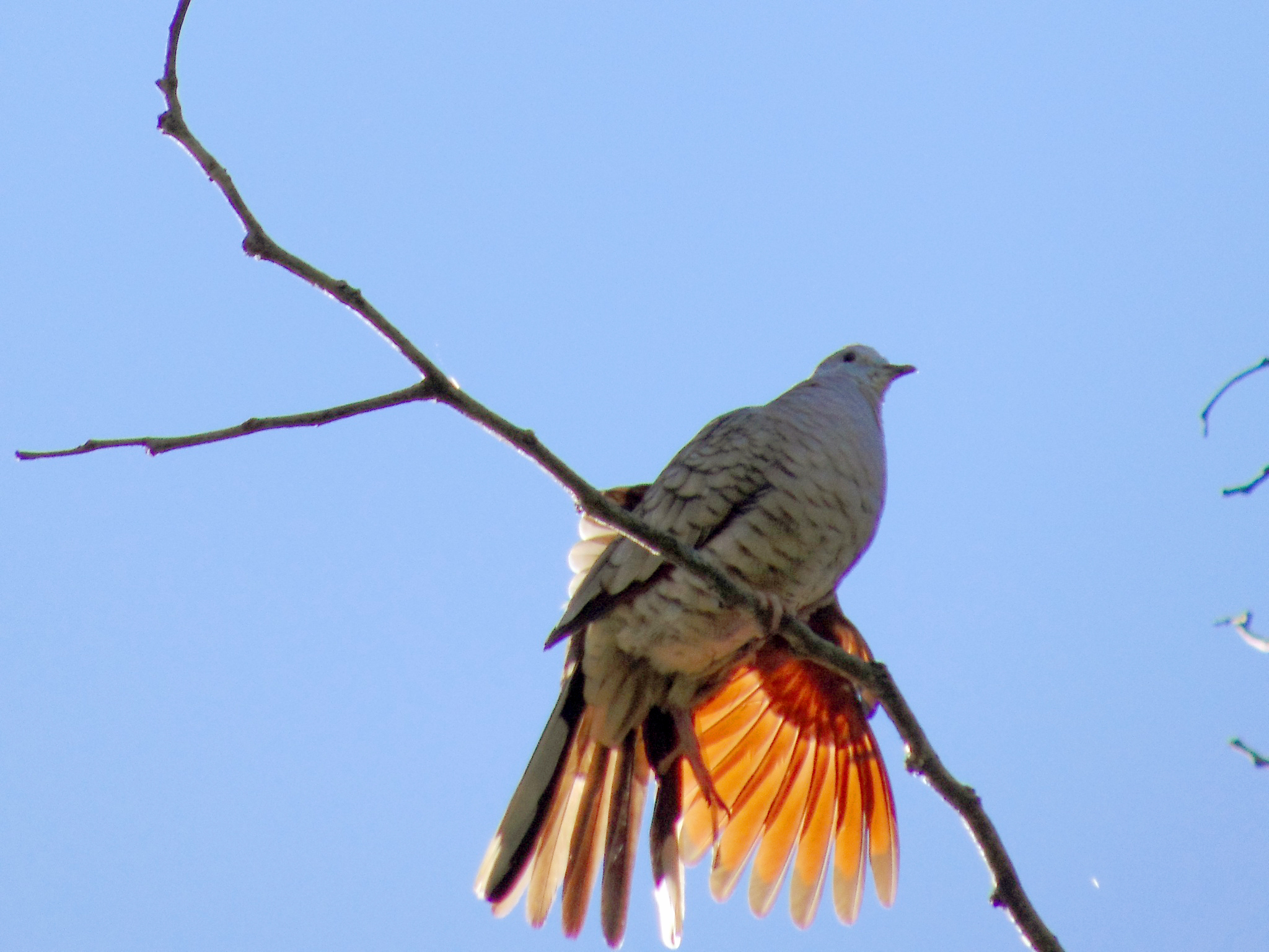 Pajarito en Rama